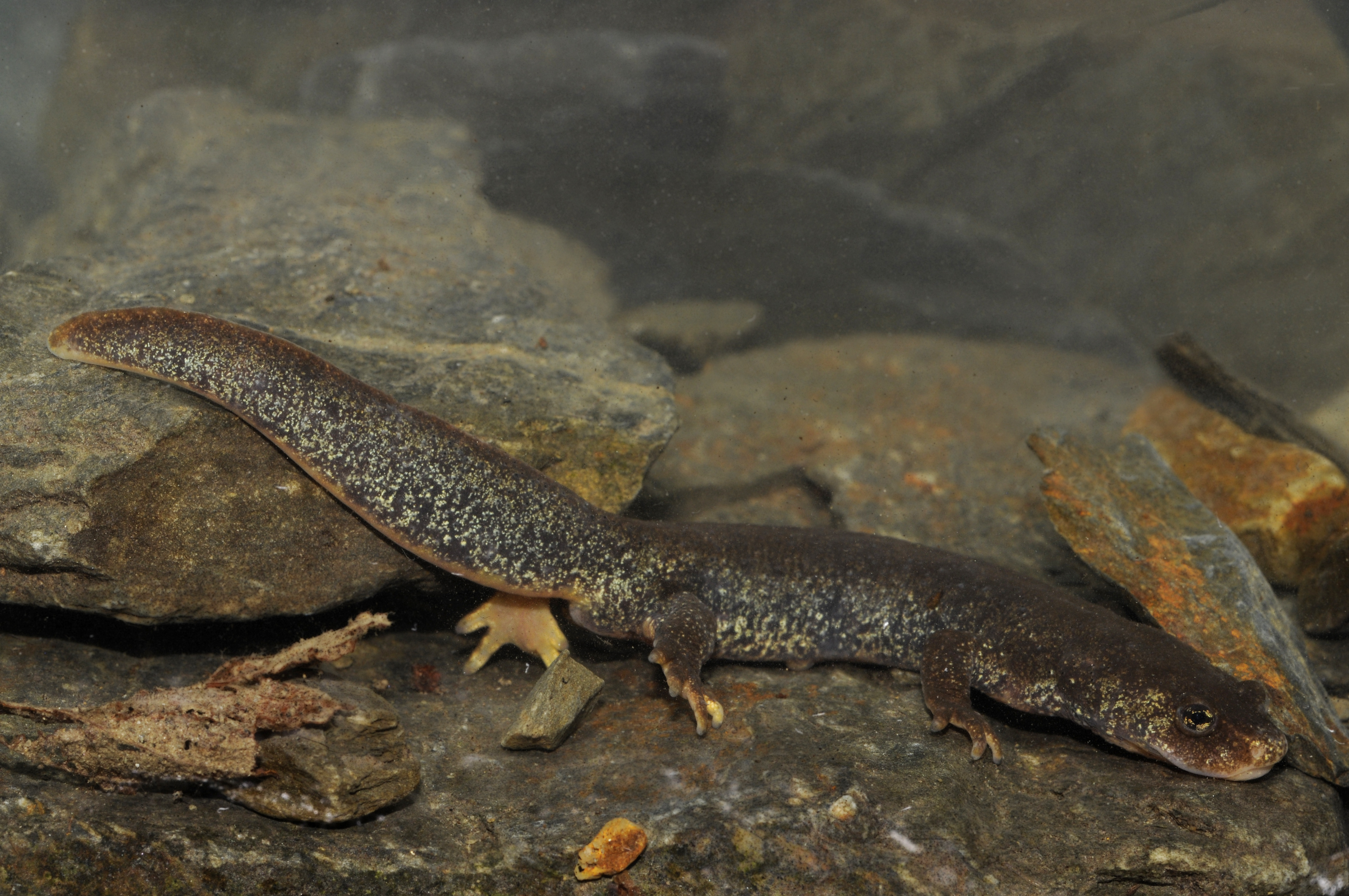 Montseny-Gebirgsmolch (Calotriton arnoldi) aus dem Montseny-Gebirge in Spanien